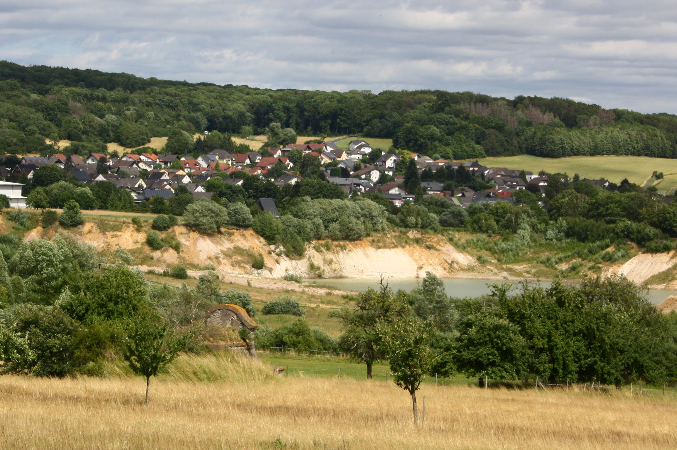 Ötzingen, Westerwald, Rheinland-Pfalz, Deutschland